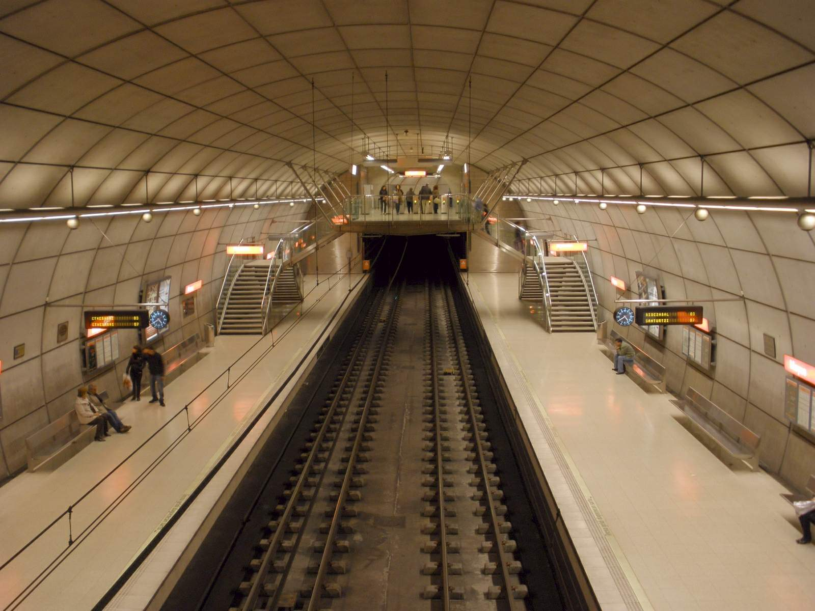 Estación de Moyúa, del Metro de Bilbao